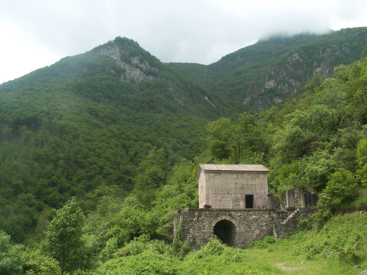 Վանական համալիր Վահանավանք 1/9.7.7